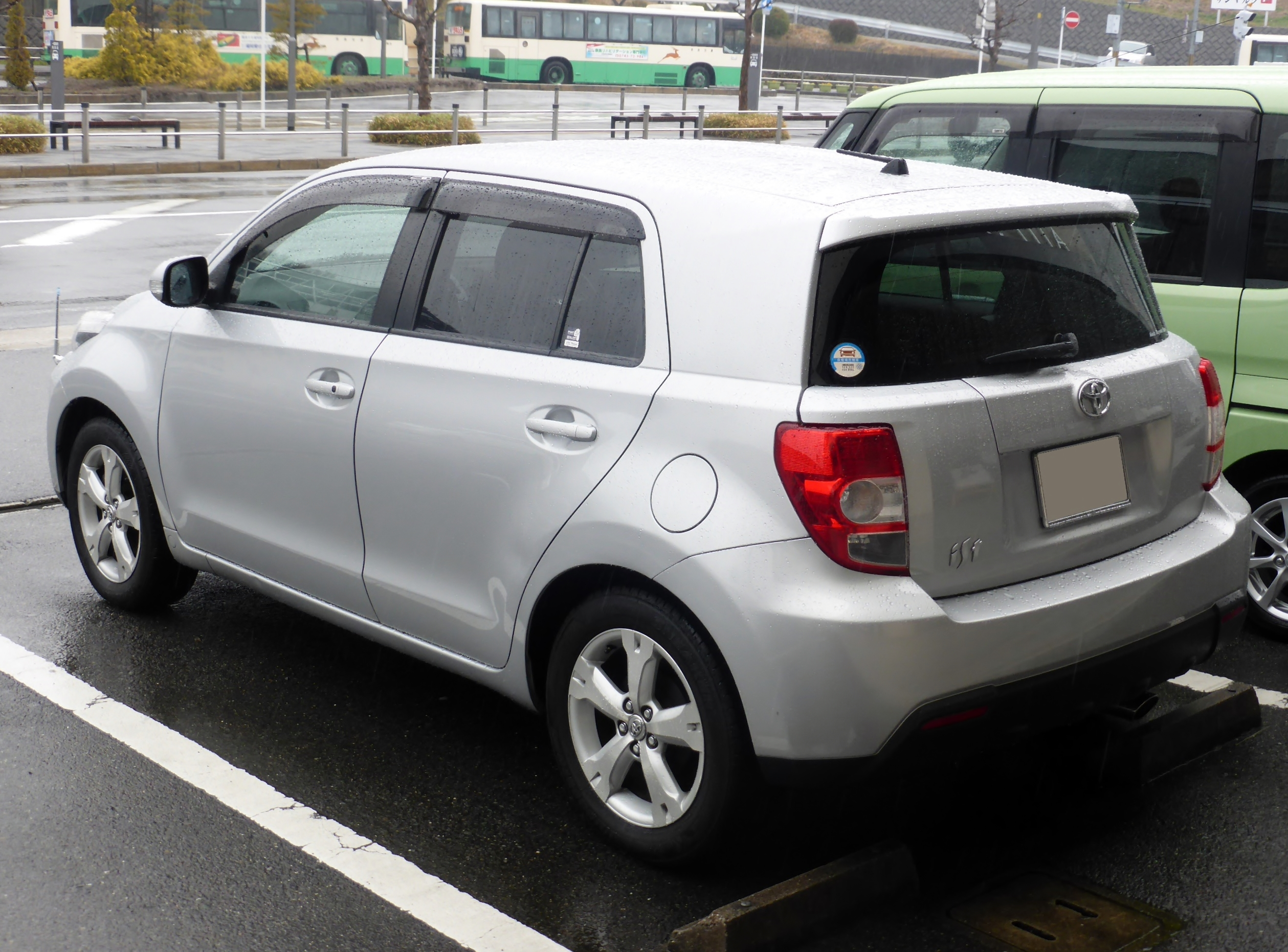 XP110型トヨタ・ist 150Gをリアから撮影。